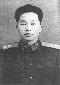 刘西元中将1955年授衔照